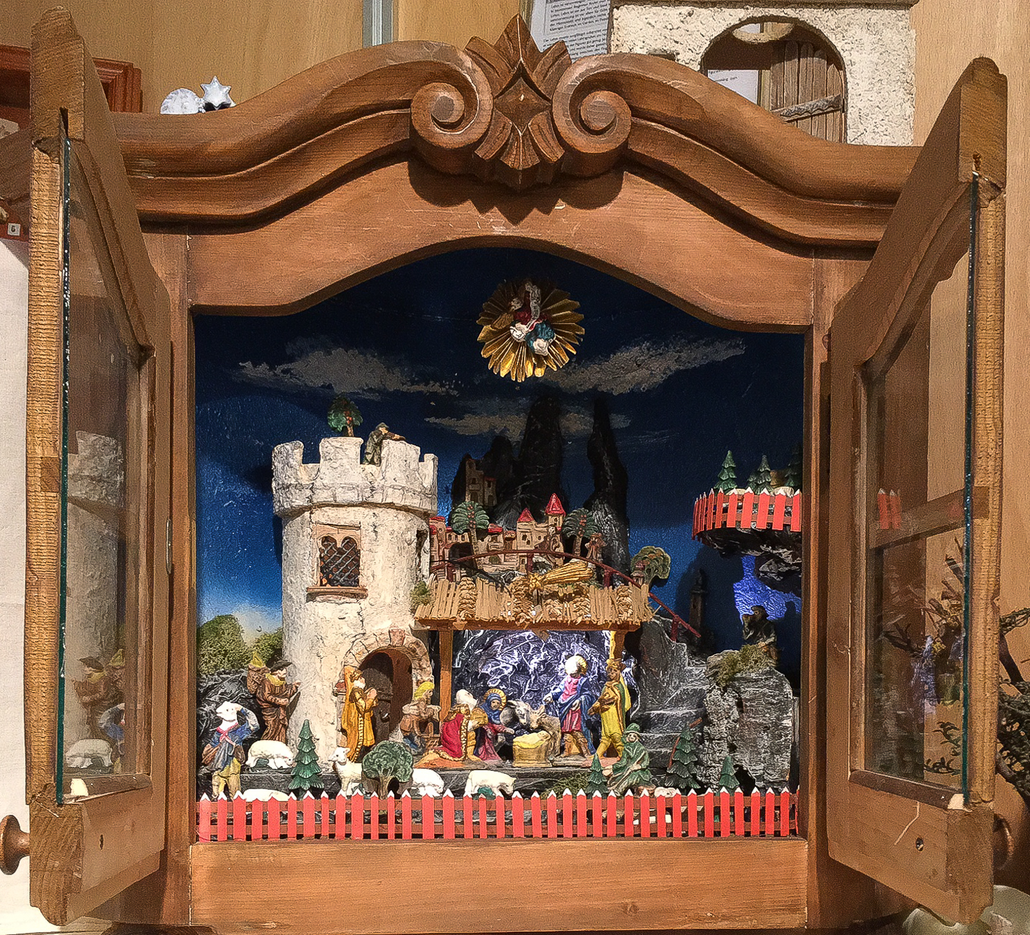 Nagelschmied Krippe aus dem Ennstal Im frühen 17. Jahrhundert entstand besonders in Oberösterreich, im Enns- und im Steyertal, entlang der Eisenhütten und Schmiedewerkstätten diese Art der reizenden Krippen. Durch die wirtschaftliche Not der damaligen Zeit hatten findige Krippeler die Idee, reliefartige Kleinfiguren aus Lehm herzustellen. Mit Modeln und Abdrücken wurden Hunderte gleiche Figürchen in Heimarbeit geformt und in den Öfen und Essen der Schmiedewerkstätten gebrannt. So bekamen viele arme Eisenarbeiter, Nagelschmiede entlang der Enns die Möglichkeit, sich um wenig Geld eine Hauskrippe zu bauen. Schaut man in eine solche Kastenkrippe, die meist durch einen Rahmen mit Glas abgeschlossen ist, und bekommt diese Fülle von bunten Figuren vor Augen, bleibt oft der erste Gedanke: „Ein Kitschkastel - vielleicht ein „Edelkitschkastel“… Macht man sich die Mühe genauer hinzuschauen, wird man bald von der Symbol- und Aussagekraft dieses kleinen Weihnachtsgeschehens begeistert sein.